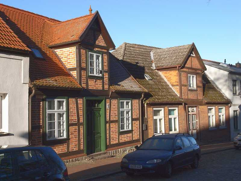 Sanierte Altstadthäuser in Laage